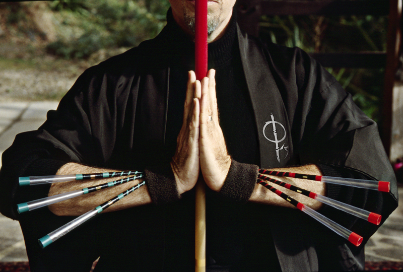 Zen-Dojo-Sarbacana (pratique du Sarbacana) Maître fondateur: Michel-Laurent Dioptaz. / Kata-Sarbacana: Gashô